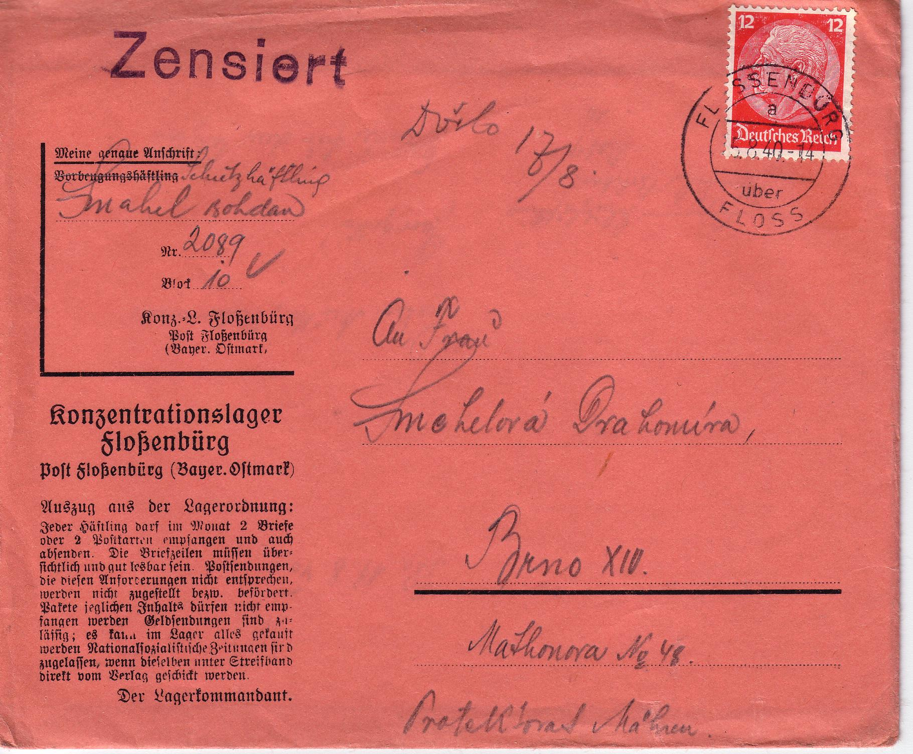 Häftlingspost aus dem KZ Flossenbürg vom 5. August 1940 Poststempel: "Flossenbürg (über Floss)